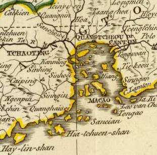 18世纪末英国人绘制的中国地图，包含了珠江三角洲地区。